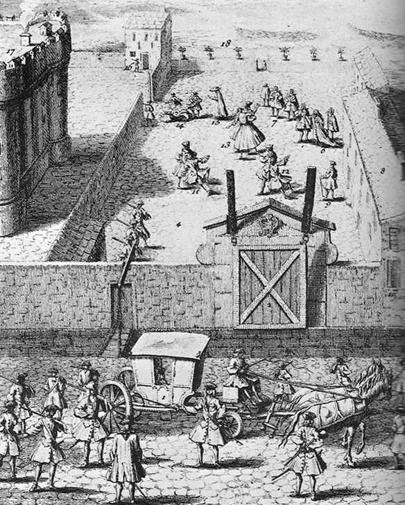 Gravure représentant l'embastillement des convulsionnaires